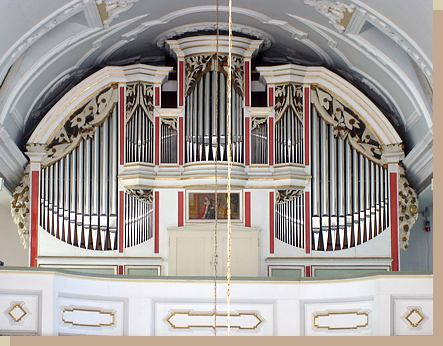 Wickerstedt